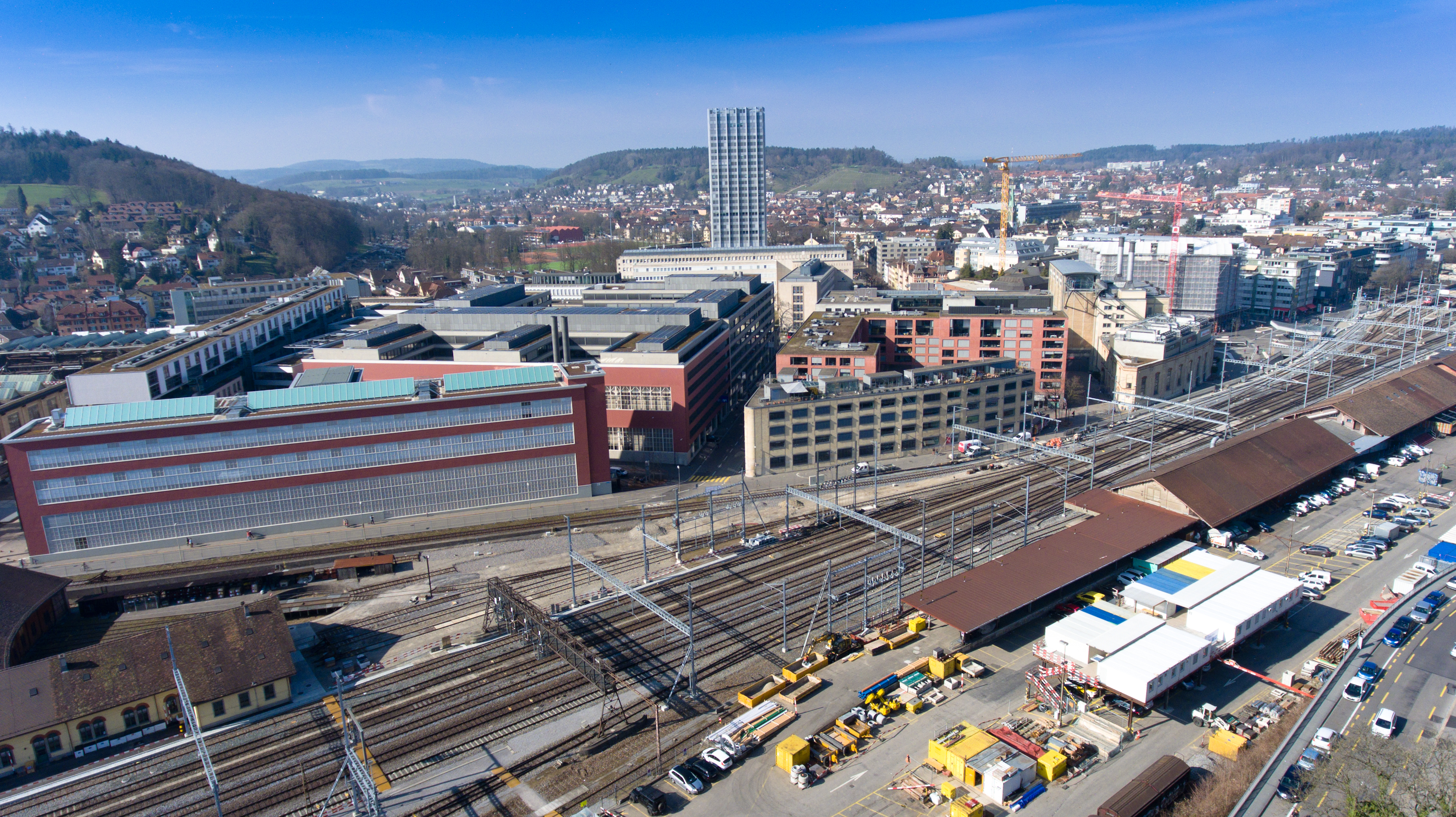 Diese Luftaufnahme zeigt einen Teil des SBB Bahnhof Winterthur sowie den Wintower.